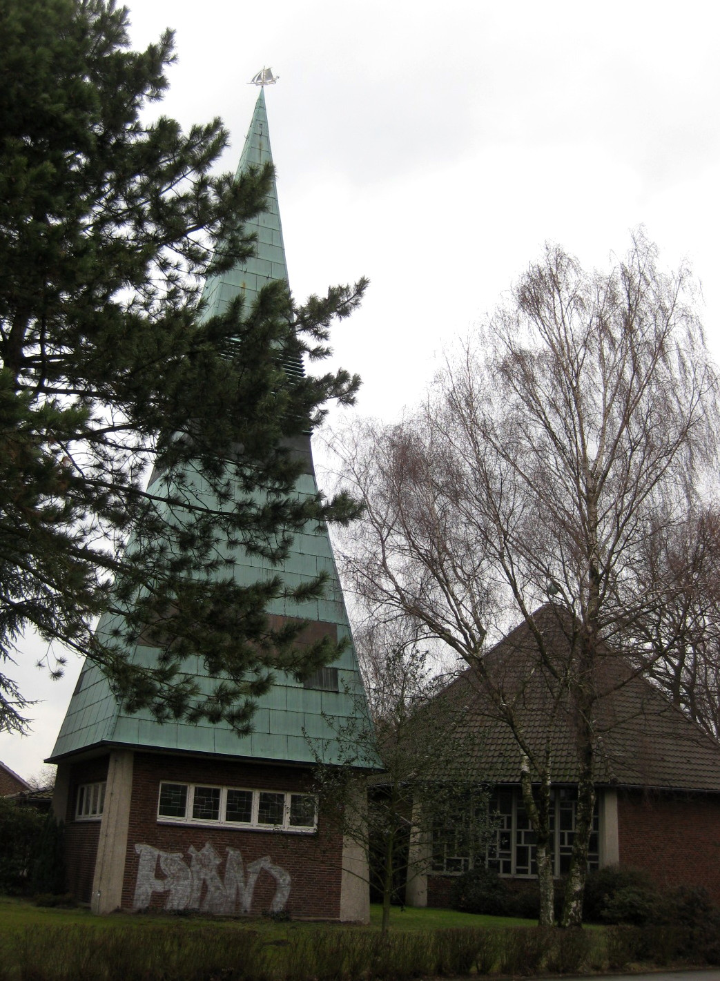 Ehemalige reformierte Erlöserkirche im Osnabrücker Stadtteil Dodesheide; 2010 genutzt von der Gemeinde der Heiligen Mutter Gottes (Theotokos) Maria der Griechisch-Orthodoxen Kirche von Antiochien in Osnabrück und Münster (Westfalen)